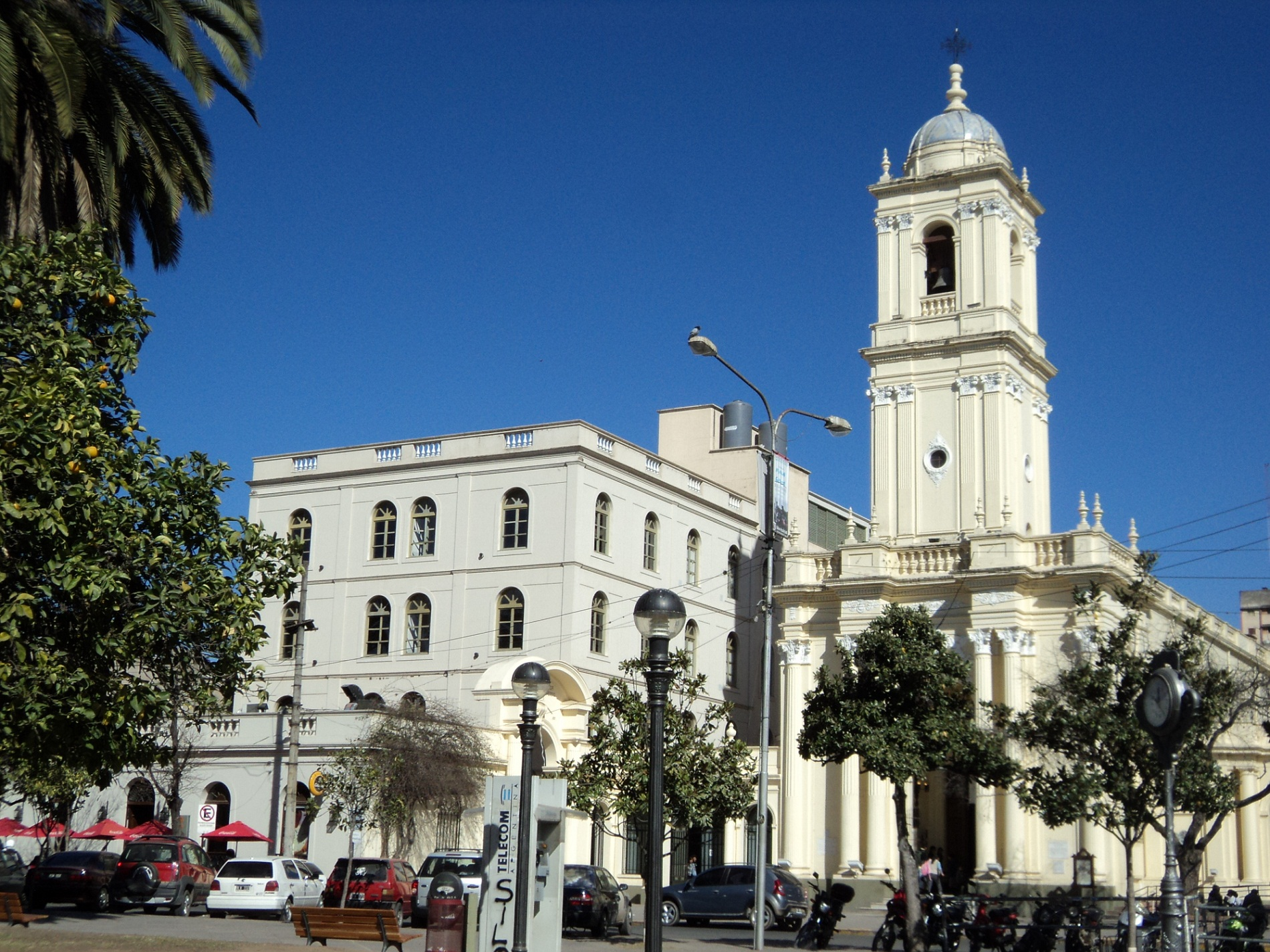 Catedral ubicada en Jujuy, Argentina